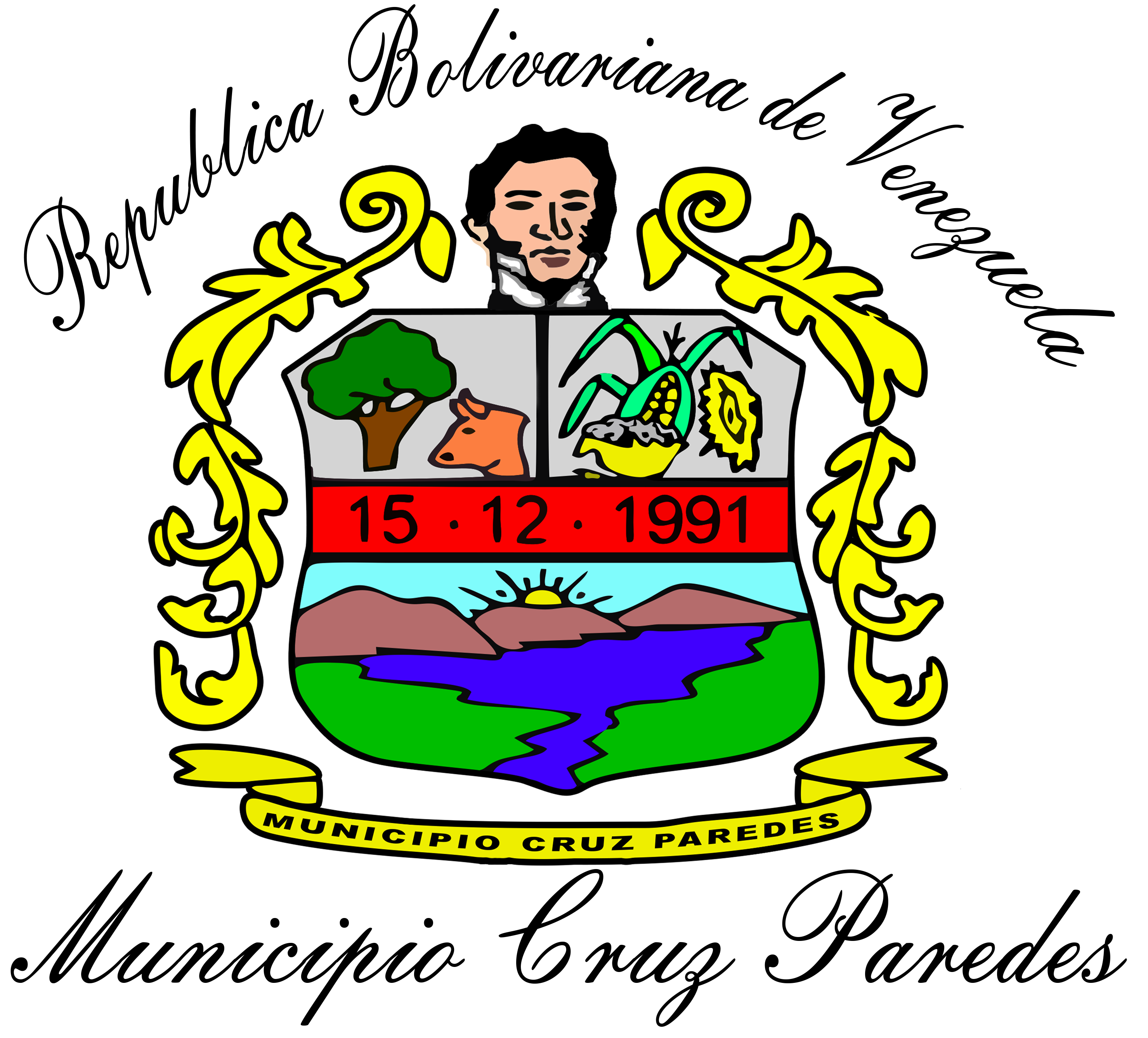 ESCUDO DEL MUNICIPIO EN MEJOR CALIDAD